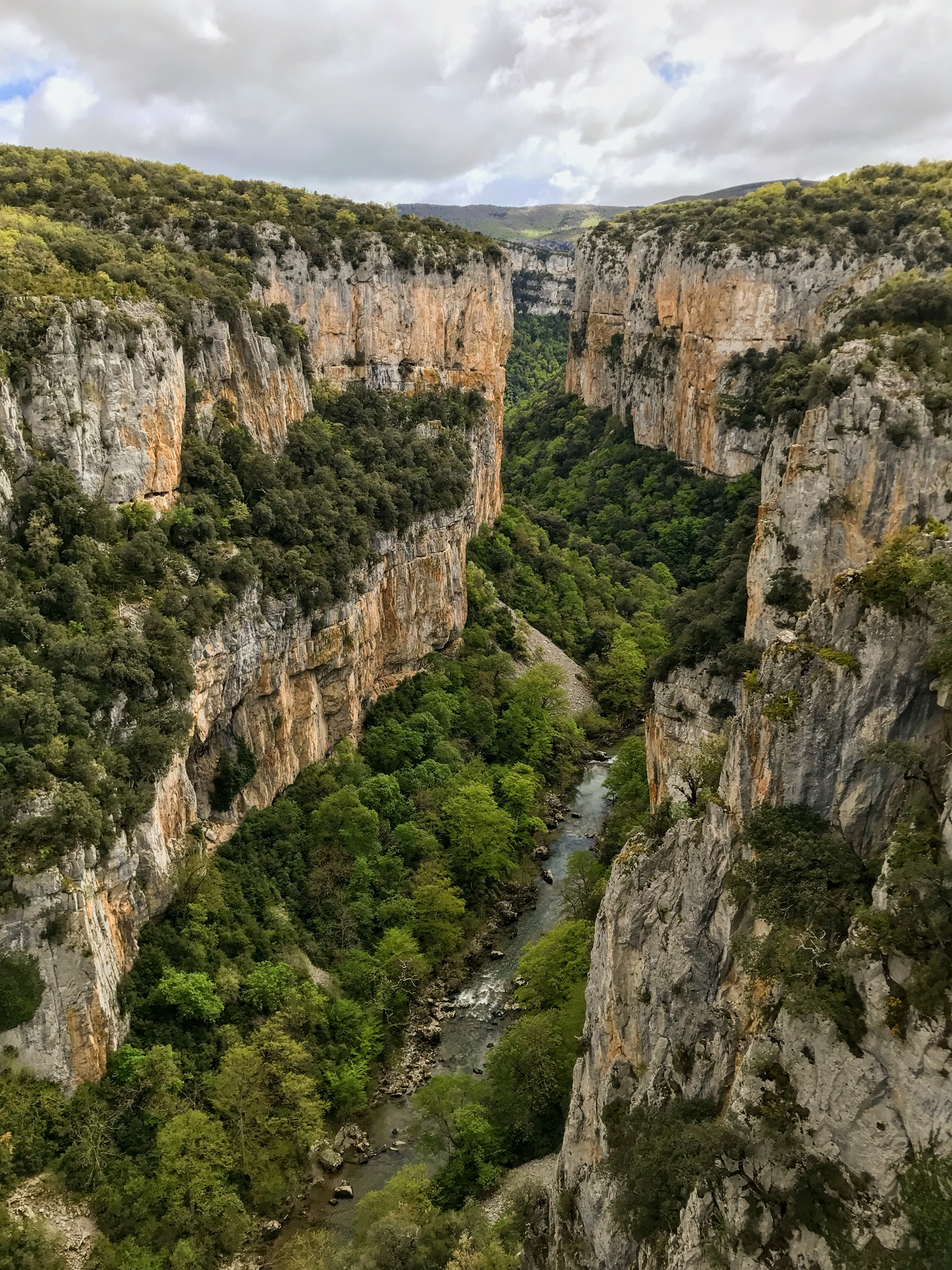 El río ha ido excavando el profundo valle.